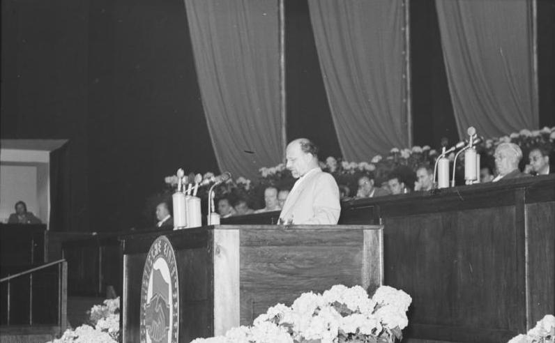 Zentralbild/Heilig 9.7.1952 II. Parteikonferenz der SED vom 9. bis 12.7.1952 Werner-Seelenbinder-Halle, Berlin. UBz:Generalsekretär Walter Ulbricht bei seinem Referat "Die gegenwärtige Lage und die neuen Aufgaben der Partei".